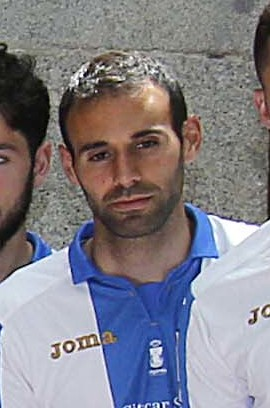 Felicidades pepineros!! Vuestro ascenso a Primera es la historia de un sueño, el resultado de vuestro trabajo y esfuerzo. Sois un orgullo para todo Madrid! Enhorabuena CD Leganés. #LeganésEsDePrimera